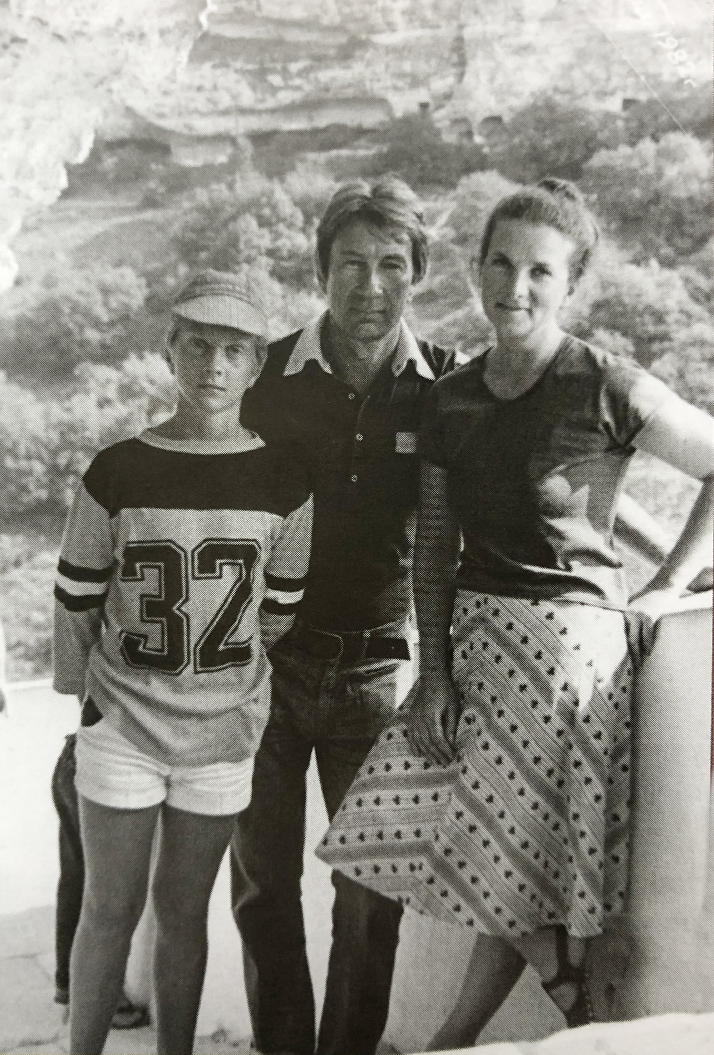 Дмитро і Валентина Мухарські разом із сином на відпочинку